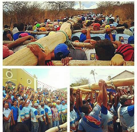 Tradicional cortejo do pau da bendeira de Jamacaru